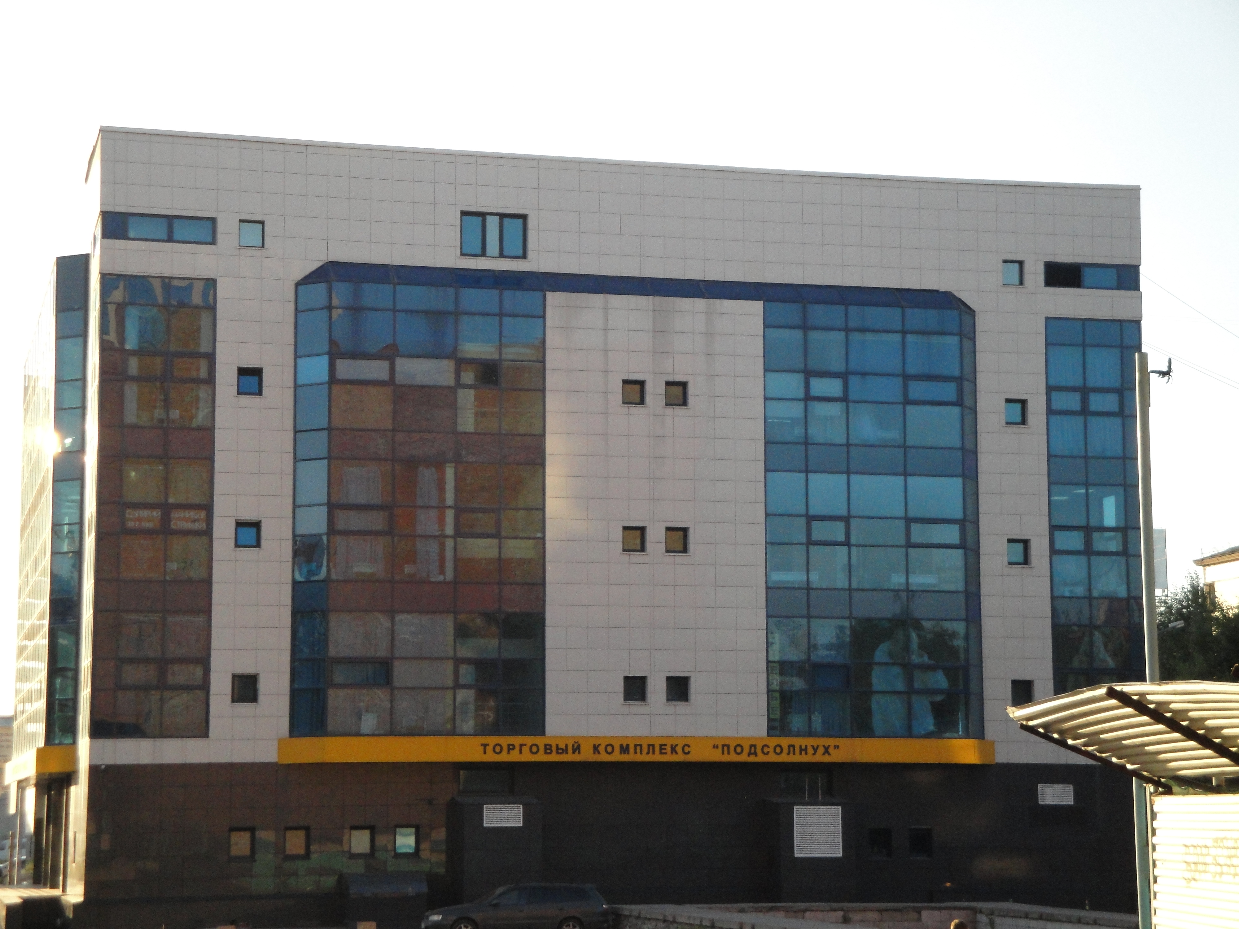 Площадь Маркса - ТК Подсолнух (вид со стороны ГУМА)